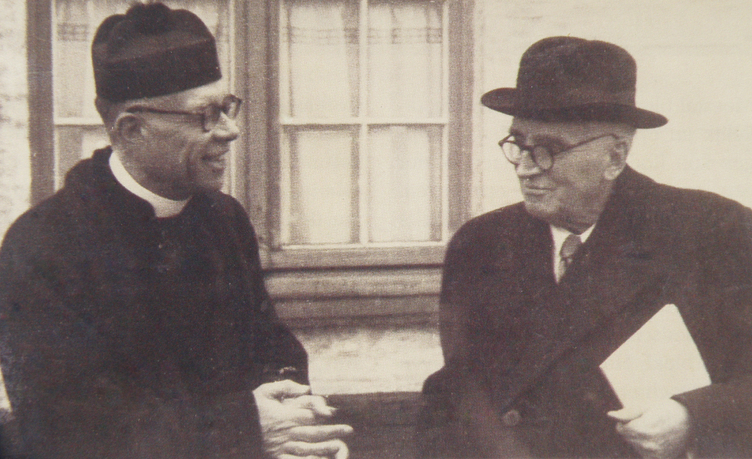 Le chanoine Rodolphe Hoornaert & l'écrivain Paul Claudel au béguinage de Bruges en 1930. Numérisé à partir de Elke Van den Broecke & Lieve Uyttenhove, Laus Deo. Rodolphe Hoornaert en zijn werk.